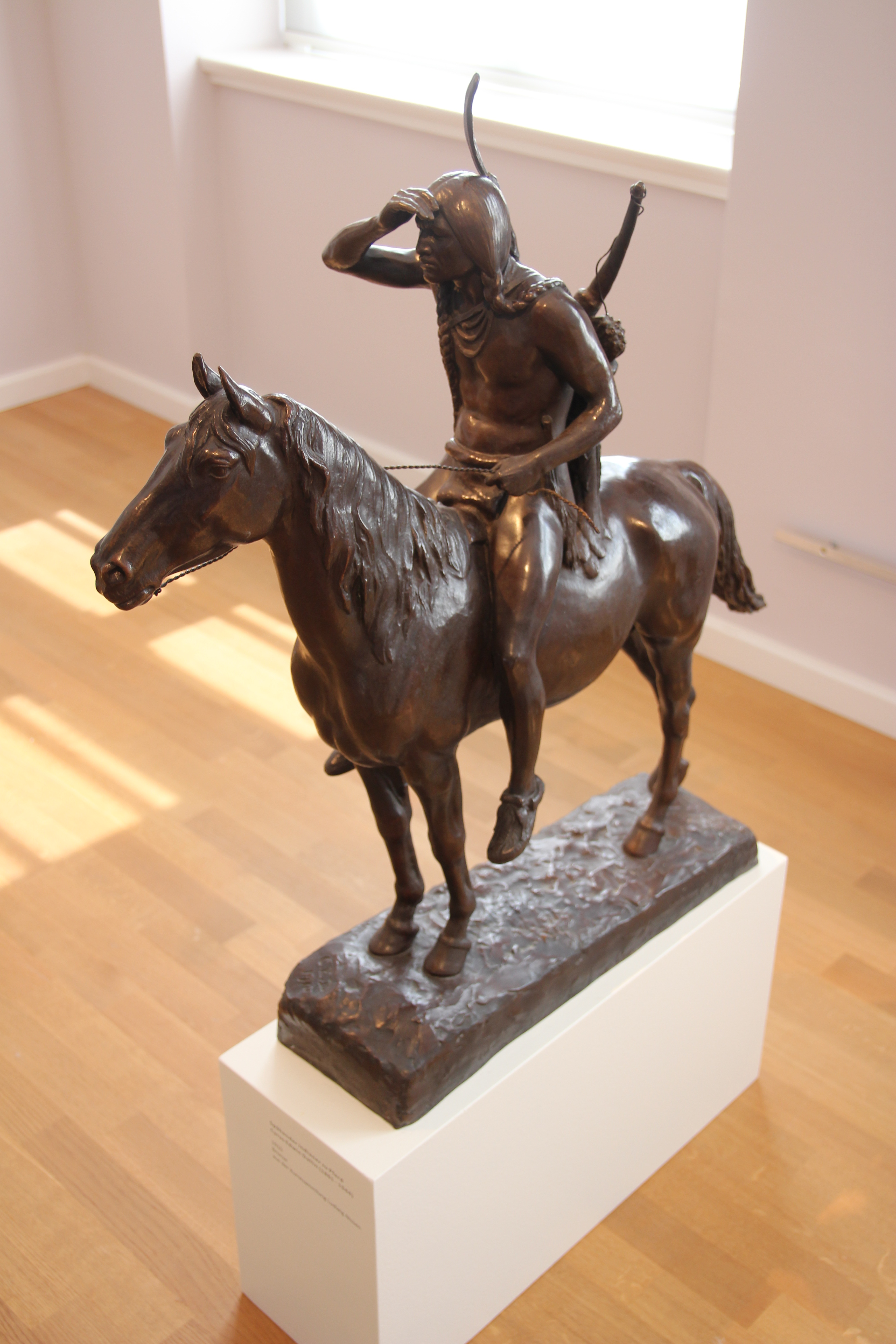 NordseeMuseum Husum (Nissen-Haus). Cyrus Edwin Dallin (1861-1944): "Spähender Indianer zu Pferd", Bronze, 1910.